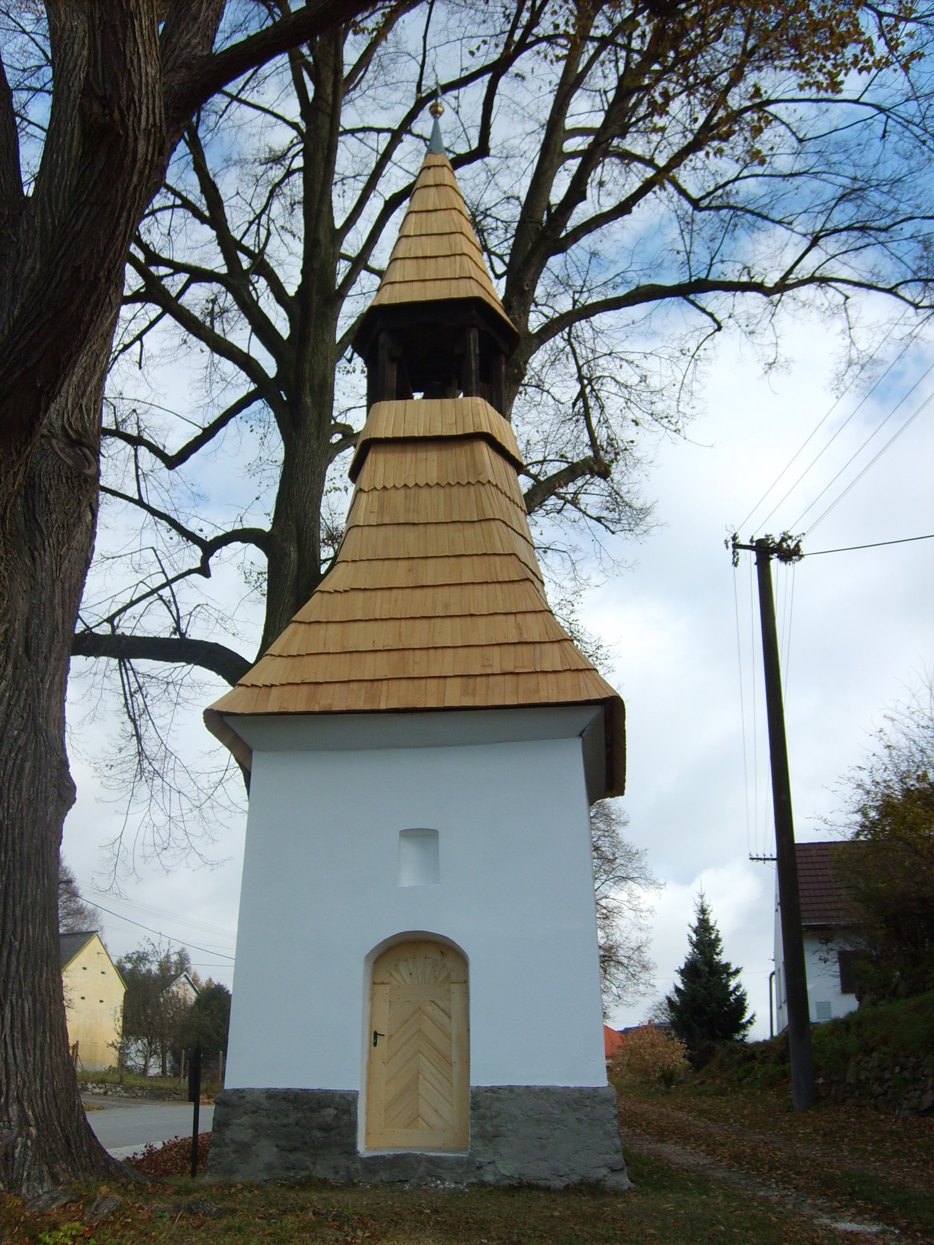 Zvonička (Ratiboř), náves, Ratiboř